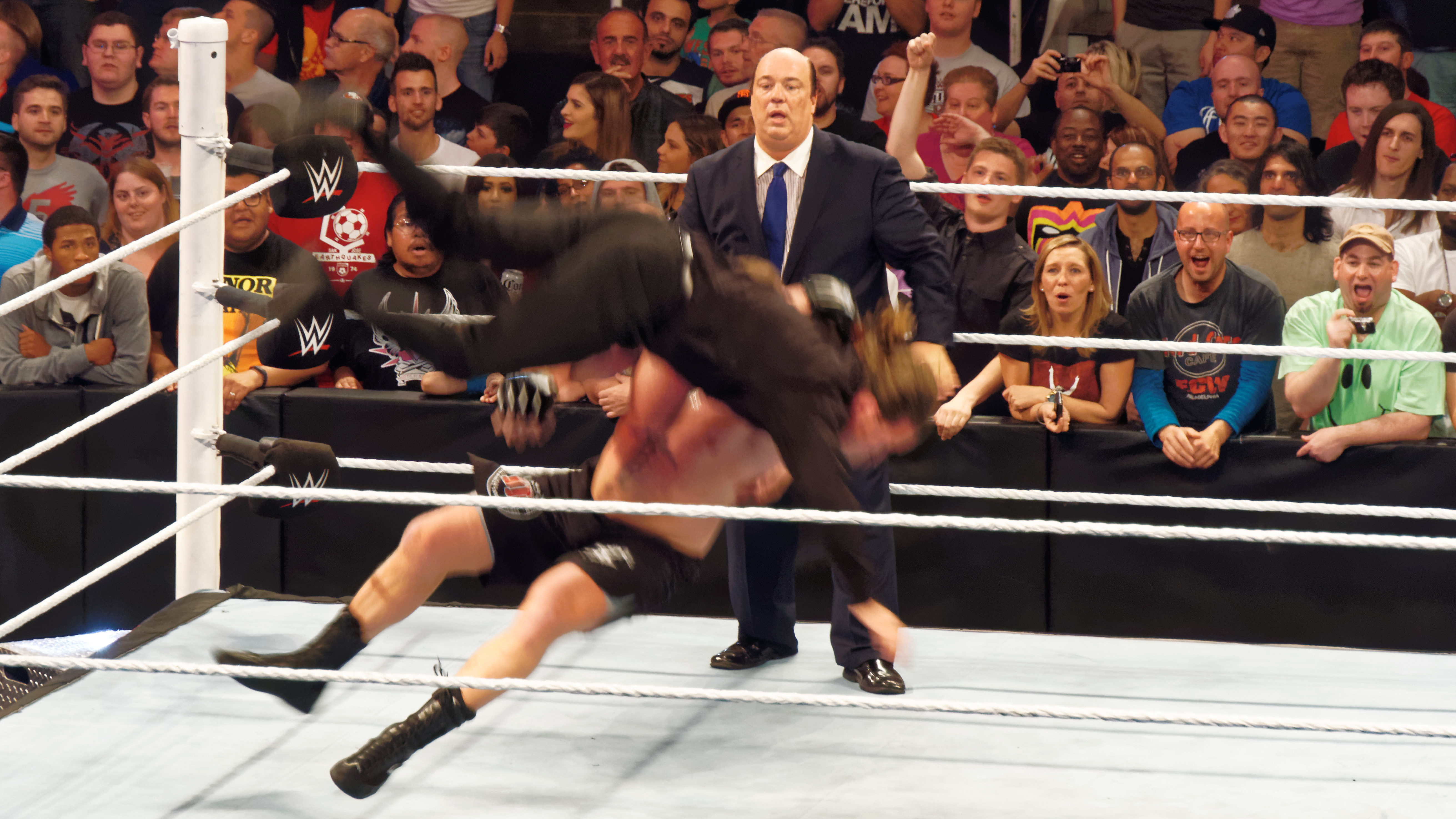 2015-03-30_18-08-47_ILCE-6000_1792_DxO